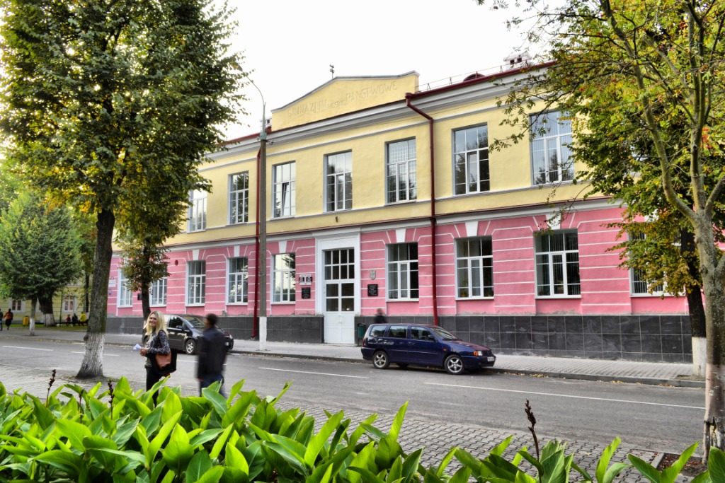 Беларуская (тарашкевіца): Гістарычны цэнтр г. Пінска: будынкі, збудаваньні, планіровачная структура, ландшафт і культурны пласт на тэрыторыі, абмежаванай з захадувул. Чарняхоўскага,з поўначы – вул. Завальнай, па мяжы дваровых тэрыторый дамоў № 1, 7,9, 11, 13, 19, 25, 27 па гэтай вуліцы, вул. Кірава, уключаючы дваровыя тэрыторыі дамоў № 1, 13 па вуліцы Кірава, з усходу – вул. Савецкай, у тым ліку дома № 5 па вул. Іркуцка-Пінскай Дывізіі, дома № 2 па вул. Кулікова, дома № 3 на пл. Кастрычніка, памяжы дваровых тэрыторый забудовы няцотнага боку дамоў № 1, 3па вул. Кіеўскай, да перакрыжаваньняз вул. Альхоўскіх, ад перакрыжаваньня з вул. Дняпроўскай Флятыліі,па вул. Дняпроўскай Флятыліі, уключаючы дваровыя тэрыторыі дамоў№ 39, 41 гэтай вуліцы, з поўдня —левым берагам р. Піна да перасячэньня з вул. Чарняхоўскага. г. Пінск This is a photo of Belarusian heritage monument. Reference number: 112Е000529 ( WLM)